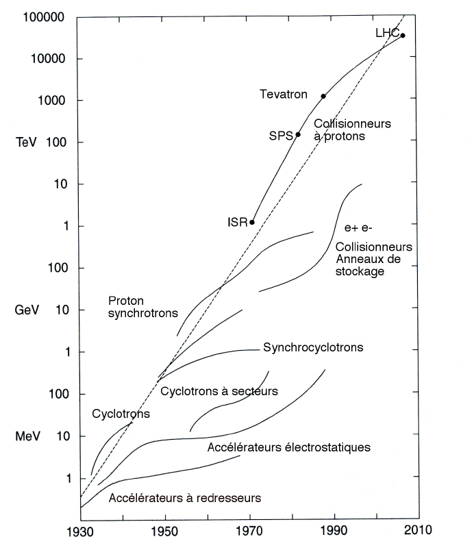 Croissance exponentielle de l'énergie des faisceaux accélérés. Remarque : pour les collisionneurs (qui produisent des collisions entre deux faisceaux de particules), l'énergie indiquée a été recalculée comme si le résultat observé était le produit de la collision de particules sur une cible fixe, ceci afin de pouvoir comparer correctement tous les accélérateurs (voir diagramme de Livingston). Ainsi, par exemple, le LHC produit des collisions entre des protons ayant chacun, en réalité, une énergie de 7 TeV (soit 14 TeV lors d’une collision frontale), alors que la valeur recalculée correspondante dans le graphique est de plus de 10 000 TeV.